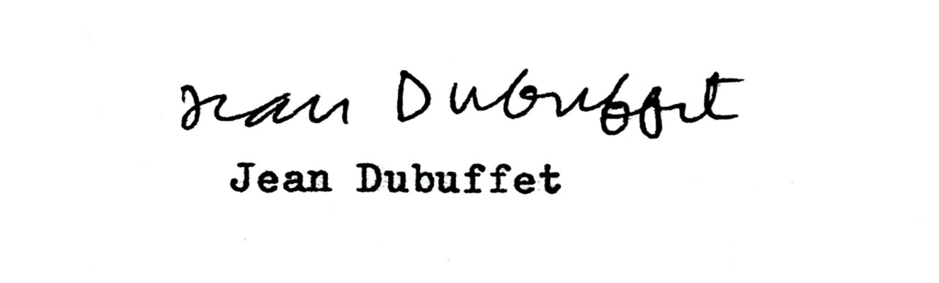 Signature du peintre Jean Dubuffet, scan d'après lettre à l'User. This signature is believed to be ineligible for copyright and therefore in the public domain because it falls below the required level of originality for copyright protection in the United States and in the source country (if different). In this case, the source country (e.g. the country of nationality of the signatory) is believed to France. Cette image ou le texte qui y est représenté est seulement composé de formes géométriques simples et de texte. Elle n’atteint pas le seuil d'originalité nécessaire pour la protection du droit d’auteur, et est donc du domaine public. See autographs of Magritte and Picasso